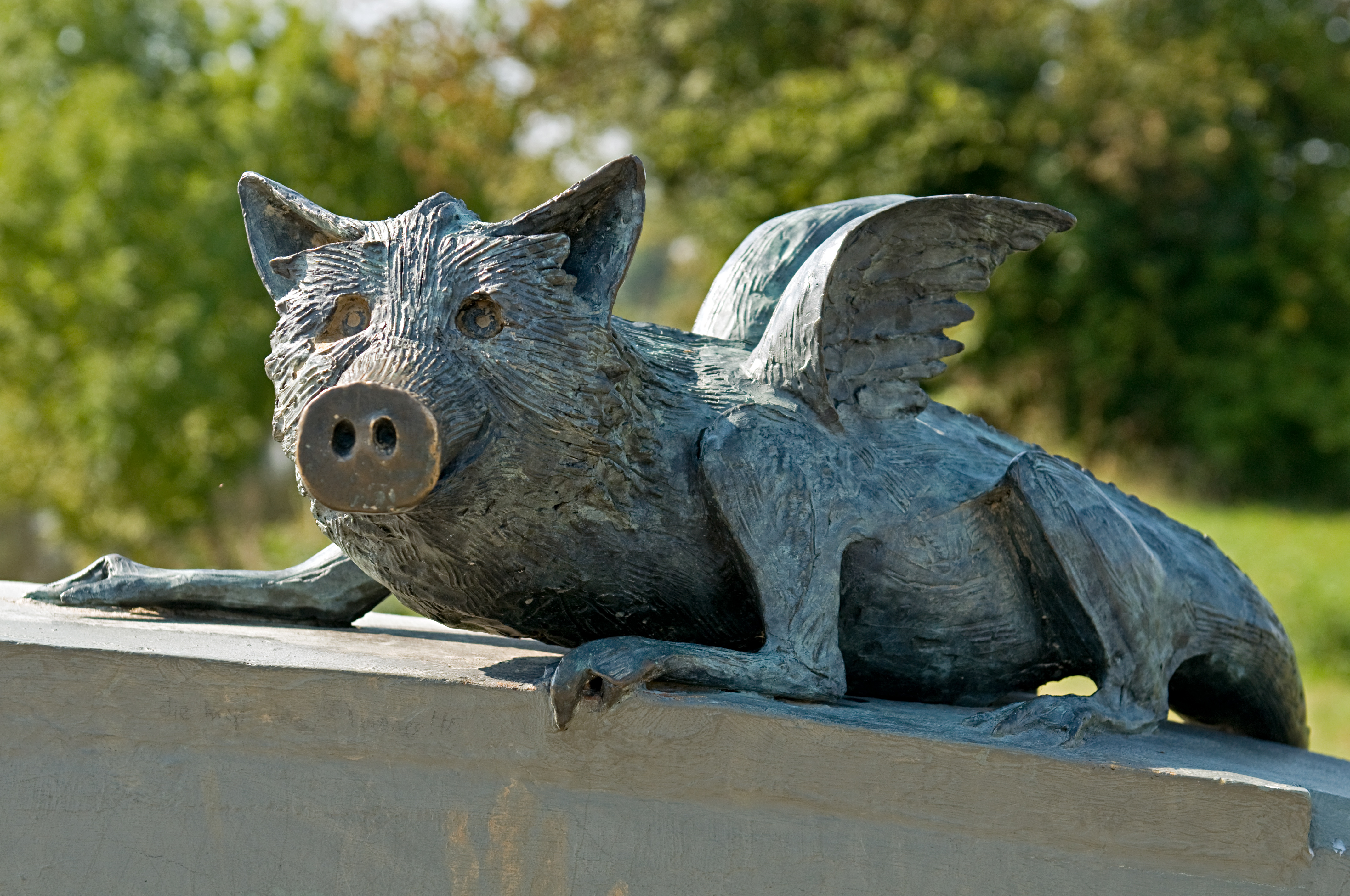 Frankfurter Grüngürteltier auf der Robert-Gernhardt-Brücke am Alten Flugplatz in Frankfurt-Bonames